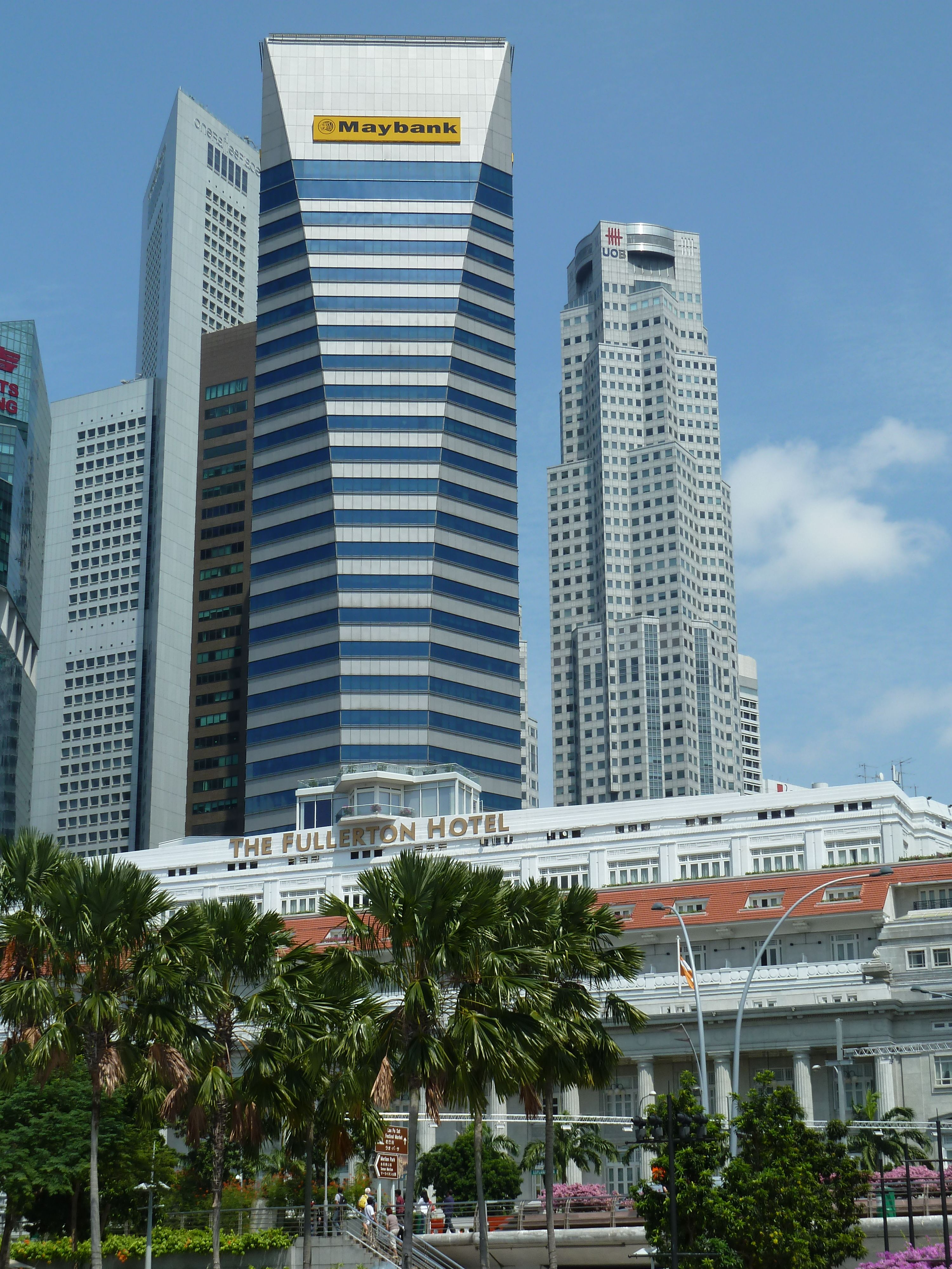 may bank シンガポール支店